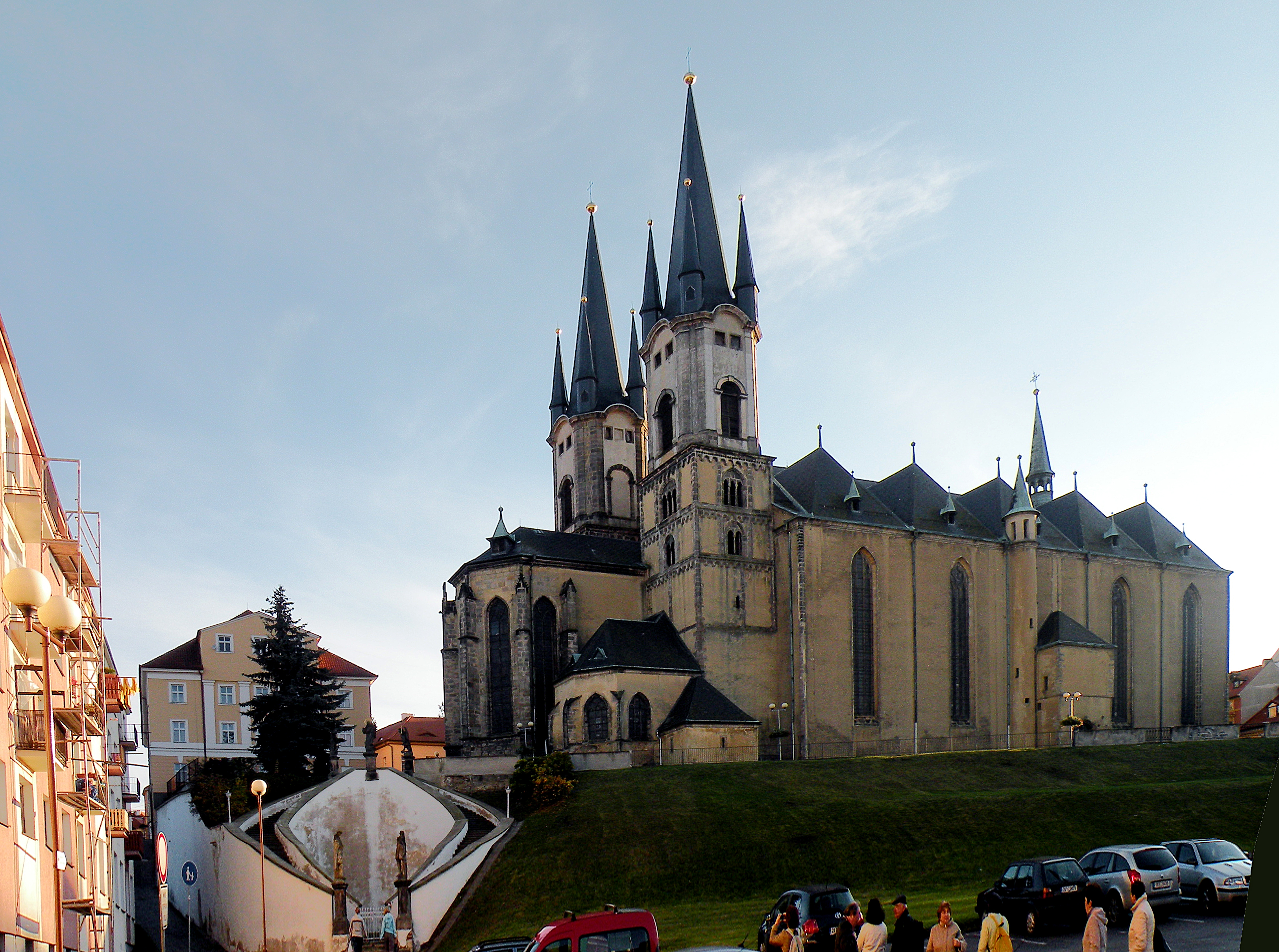 Хеб (Эгер).Собор Св.Николая